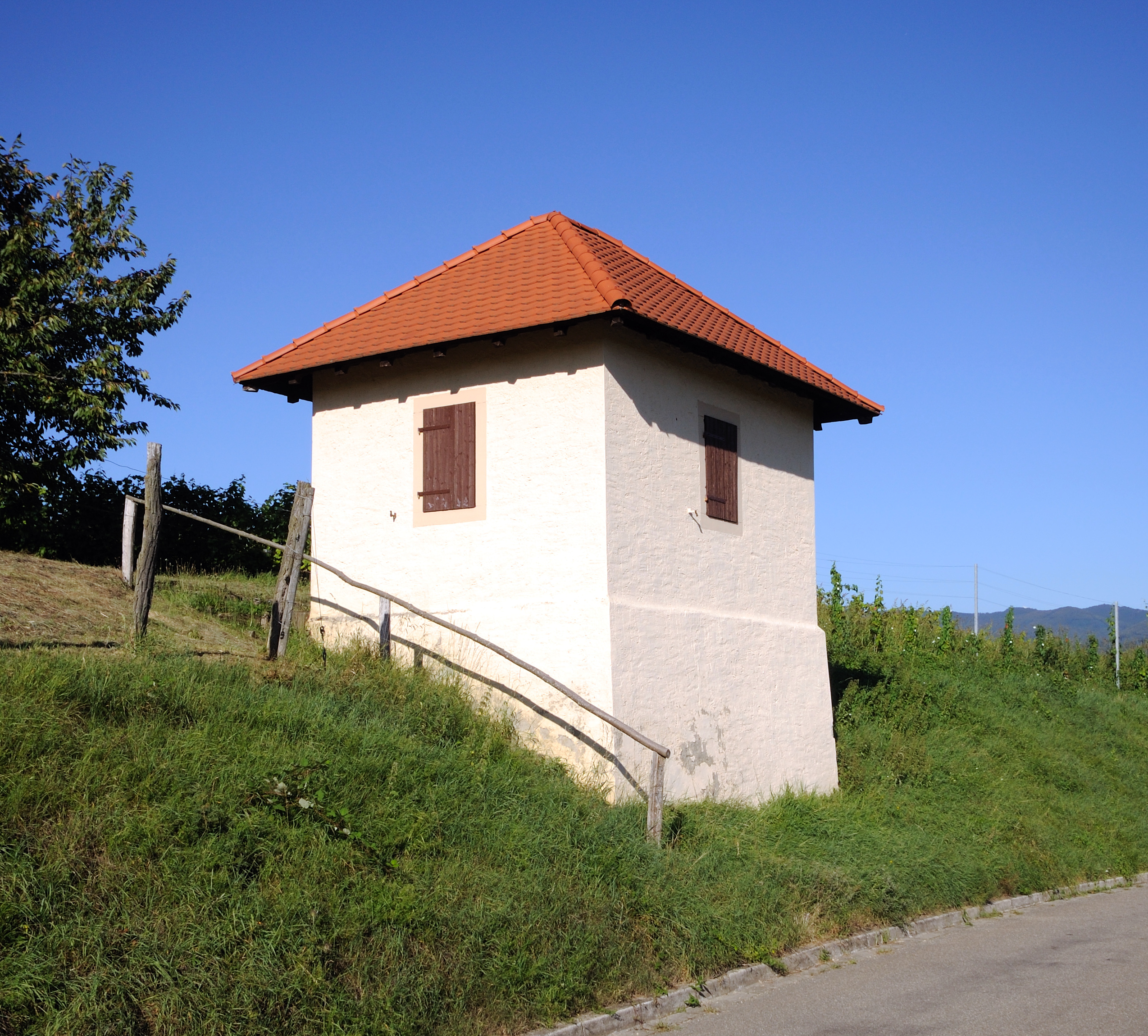 Bammerthüsli in Tannenkirch